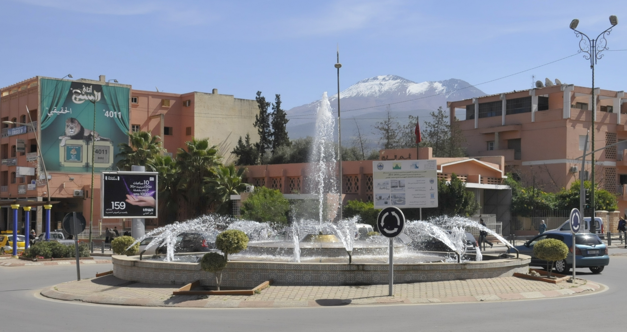 Beni Mellal, Marokko, Kreisverkehr in der Av. Mohammed V.